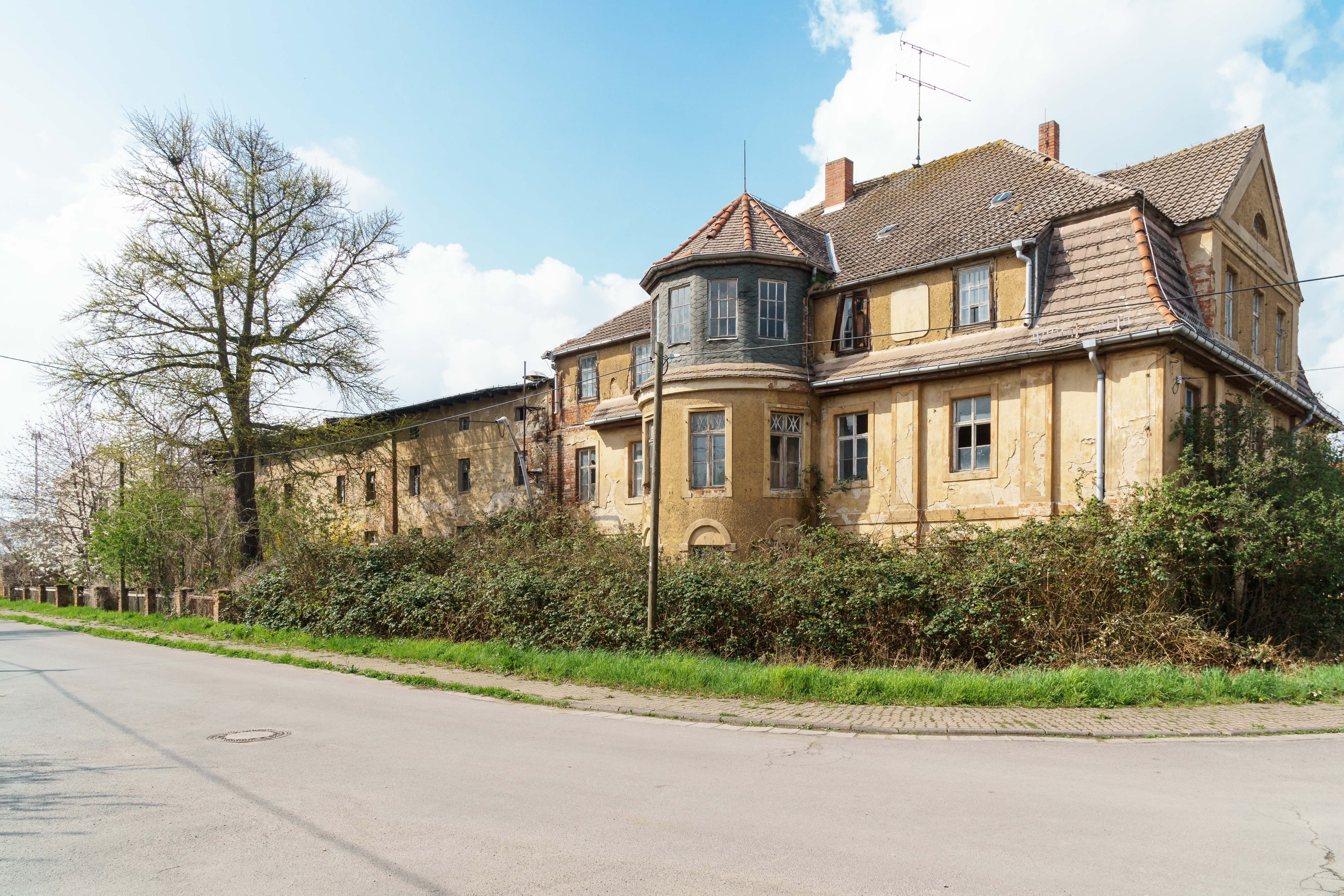 Herrenhaus, Ammelgoßwitz 21 in Belgern-Schildau OT Ammelgoßwitz